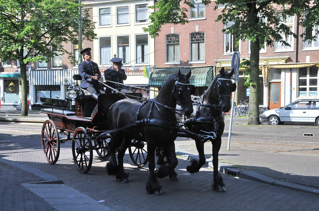 Brouwersgracht